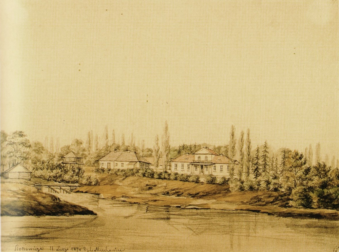 Widok folwarku Piotrowicze (powiat kobryński, obecnie rejon żabinecki) znad rzeki Muchawiec od zachodu Wymiary: wys. 22,5 cm, szer. 29,8 cm Materiały: papier, akwarela, ołówek Techniki: rysunek Nr identyfikacyjny: MNK III-r.a-4398 Właściciel: Muzeum Narodowe w Krakowie